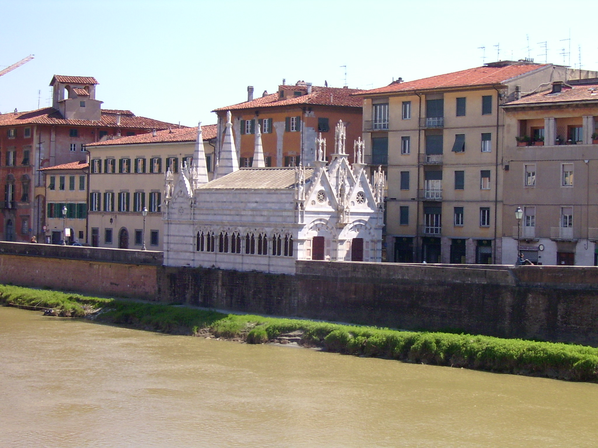 Chiesa di Santa Maria della Spina, Pisa (Toscana, Italia)